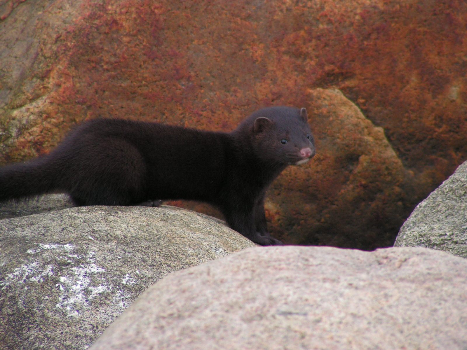 Mustela vison